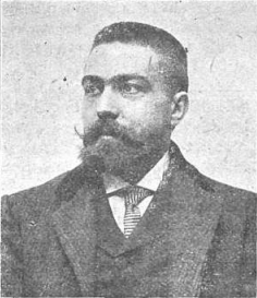 Político tradicionalista